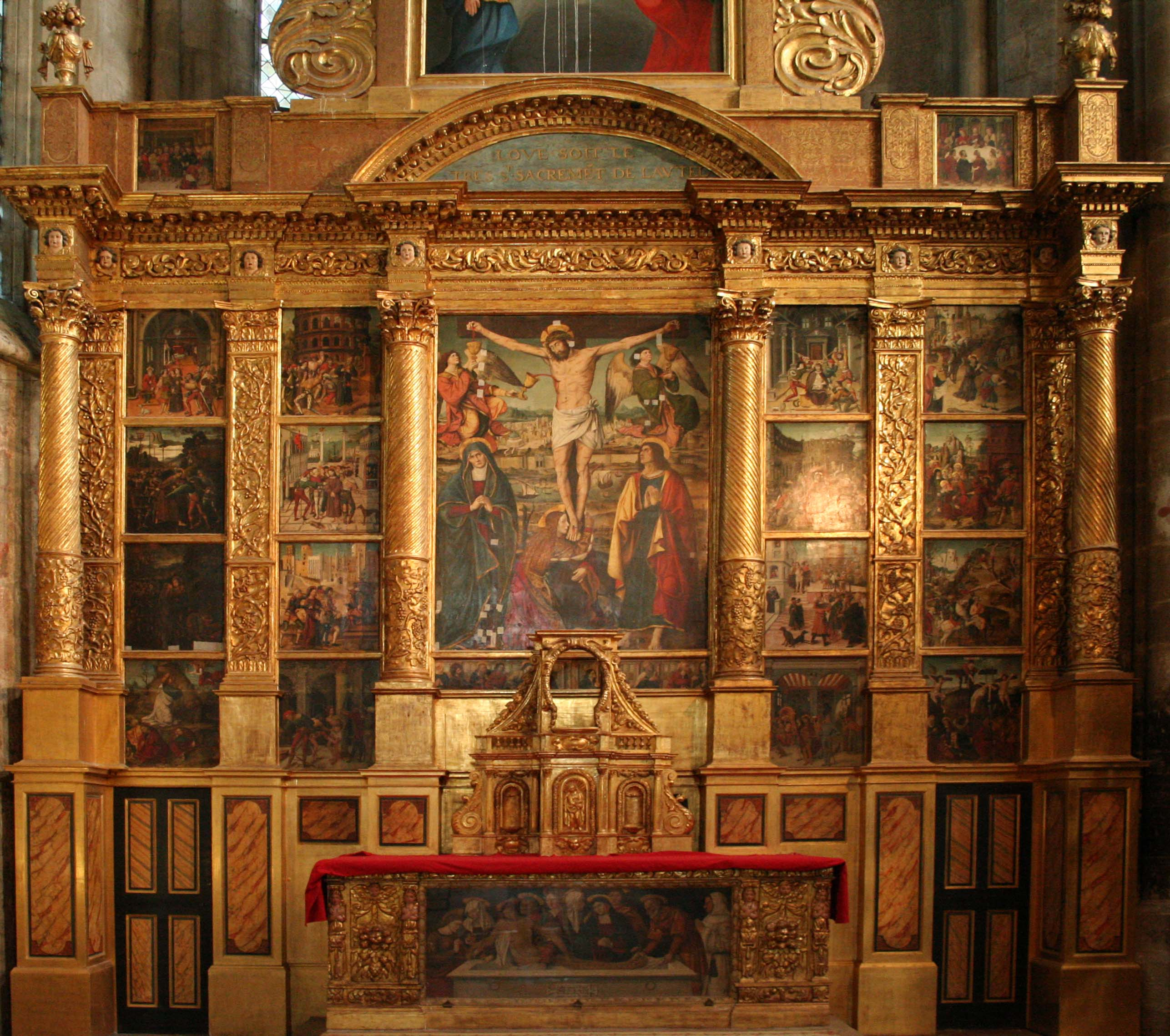 Basilique de Saint-Maximin dans le département du Var consacré à sainte Marie-Madeleine. Rétable de la crucifixion réalisé entre 1517 et 1520 par Antoine Ronzen de l'école vénitienne.